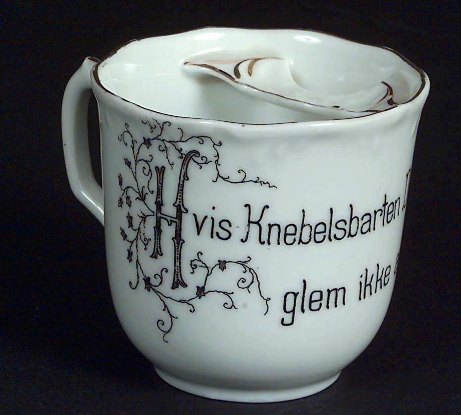 Bartekopp fra Porsgrunds Porselænsfabrik produsert ca 1908. innskrift: "Hvis Knebelsbarten Du vil holde grei, / glem ikke at benytte mig!" Norsk Folkemuseum. NF.1985-0623.